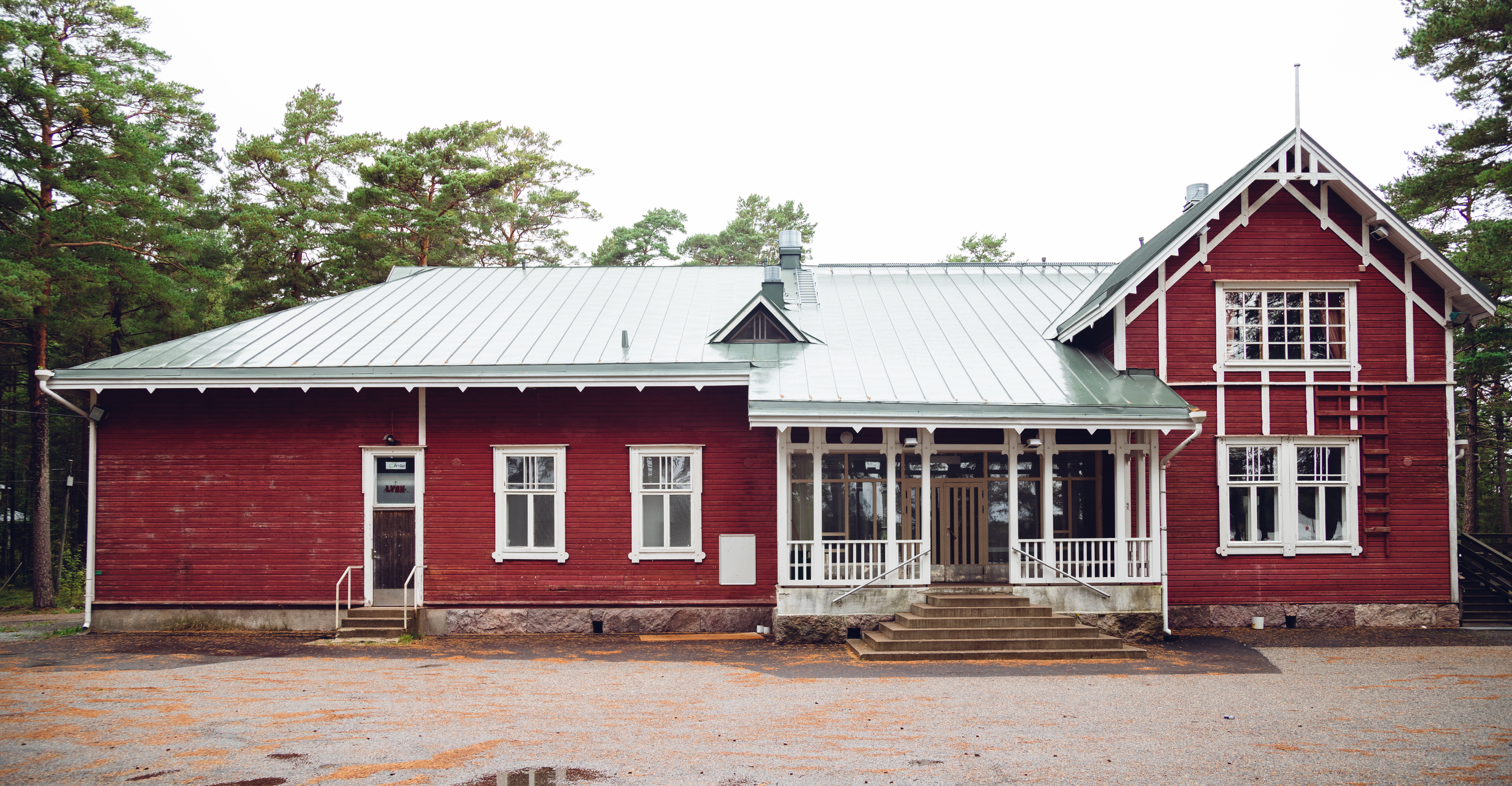 Nagu Framnäs huset framsida